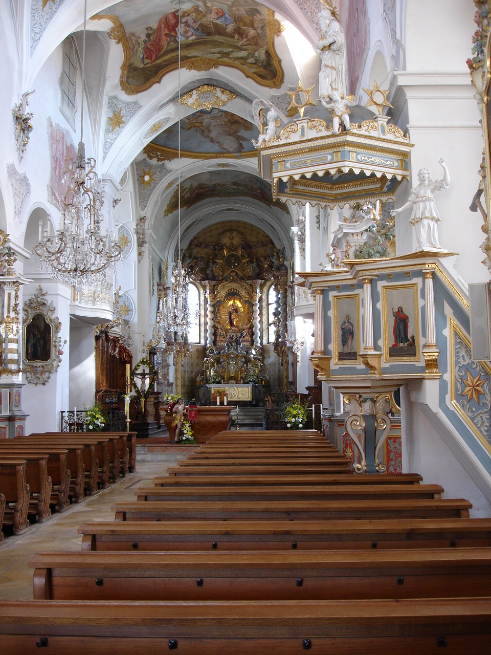 Innenansicht der Klosterkirche Windberg, Landkreis Straubing-Bogen